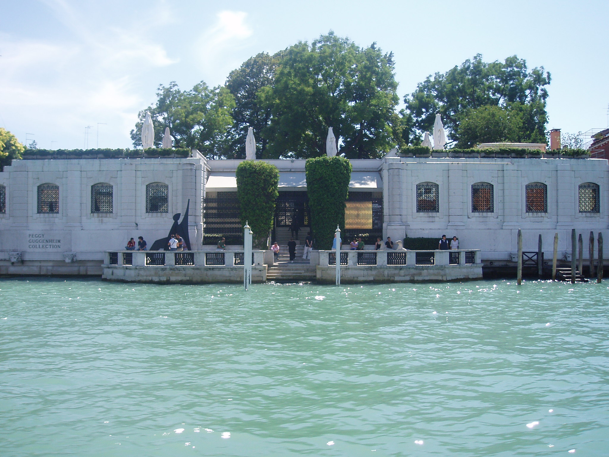 musée guggenheim venise